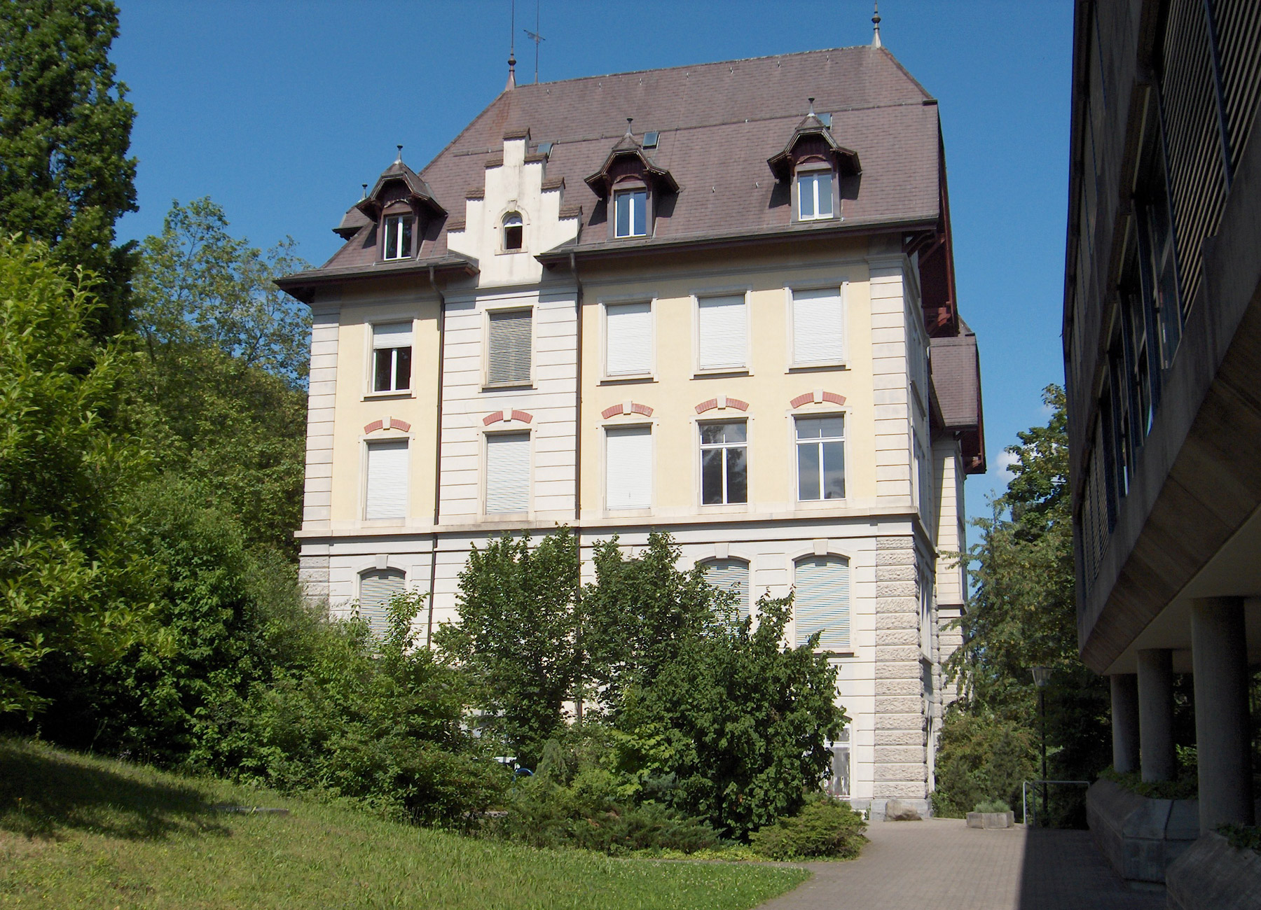 Brugg: Pädagogische Fachhochschule Fotografiert durch Voyager, 28. Juni 2006